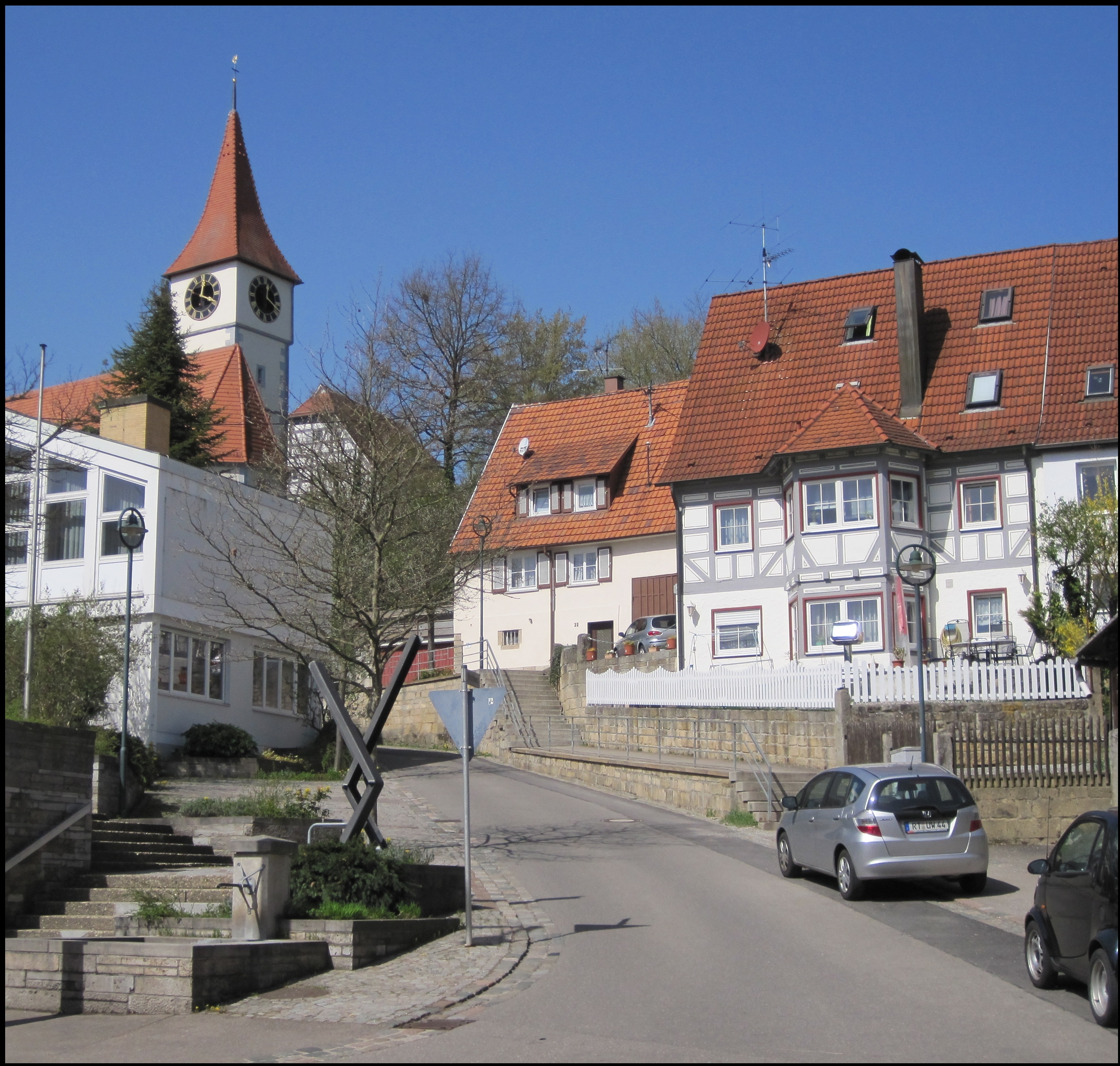 Blick auf Kirche und Ortskern von Aichtal-Aich